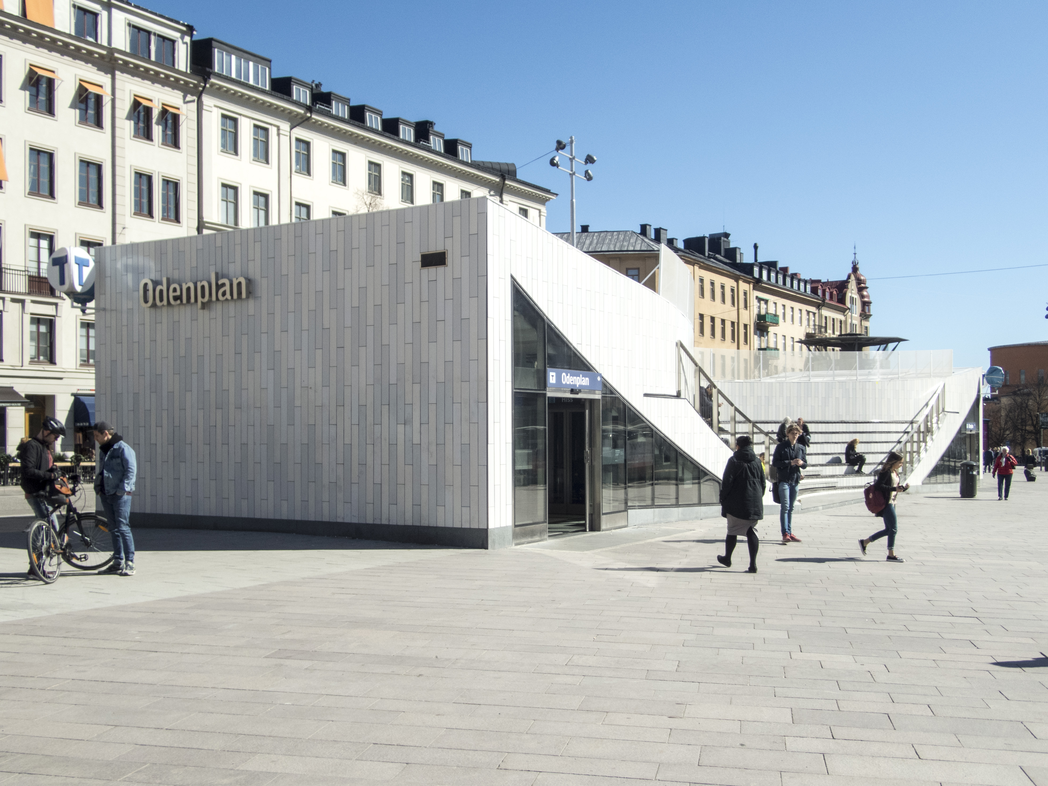 Odenplan 2017. Stationsnedgång ritad av 3XN arkitekter